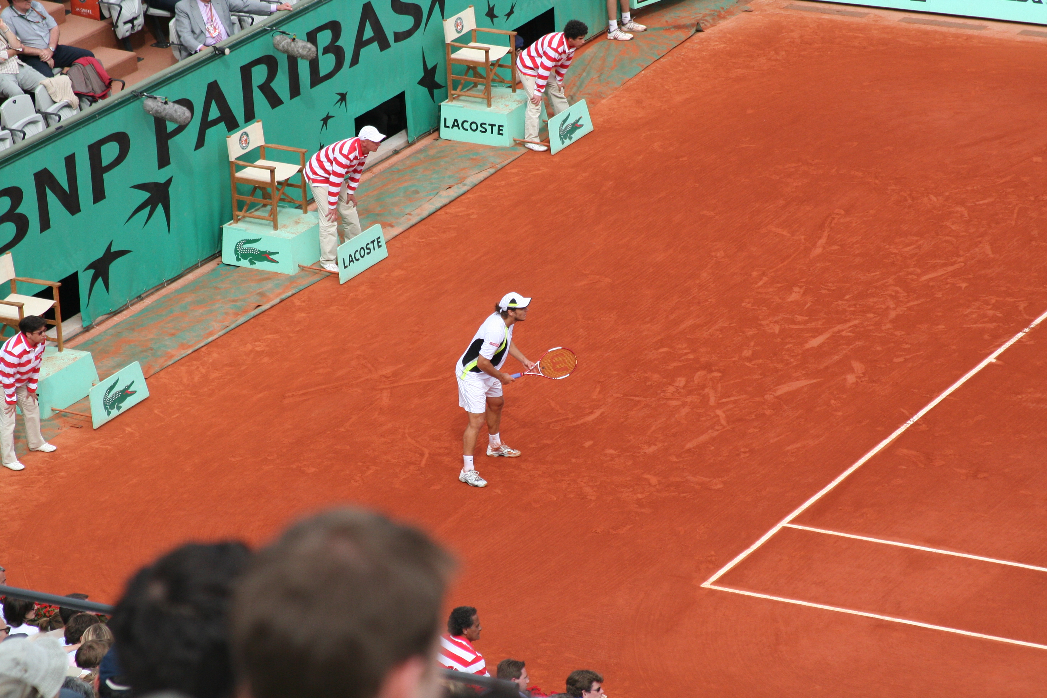 Photo personnelle. Gaston Gaudio à l'entraînement.